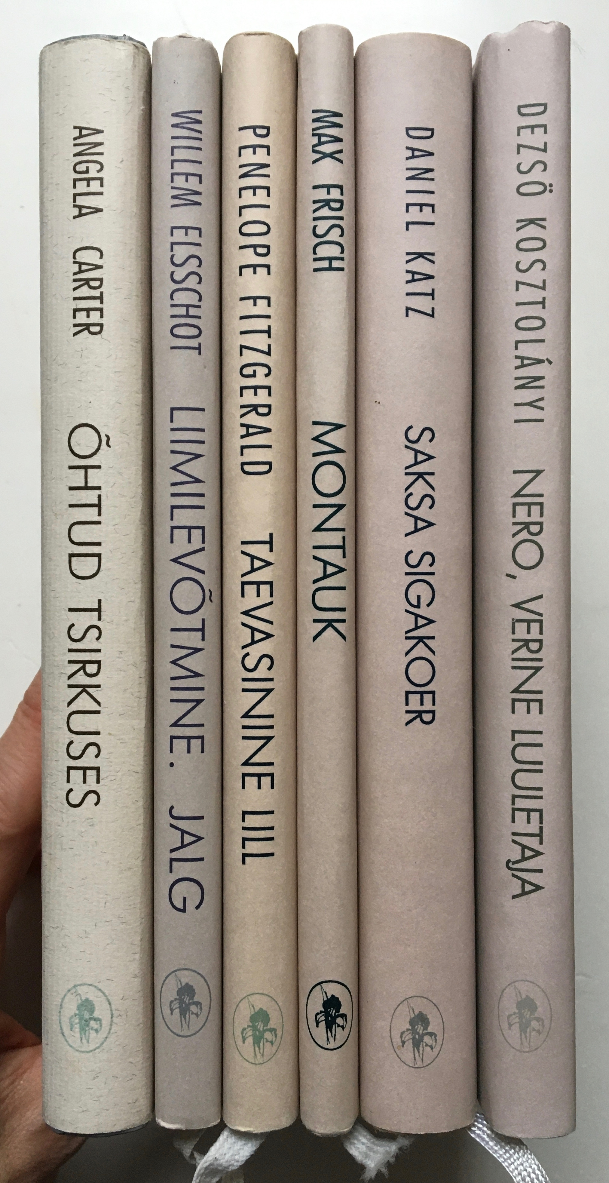 Iiris raamatute seljad